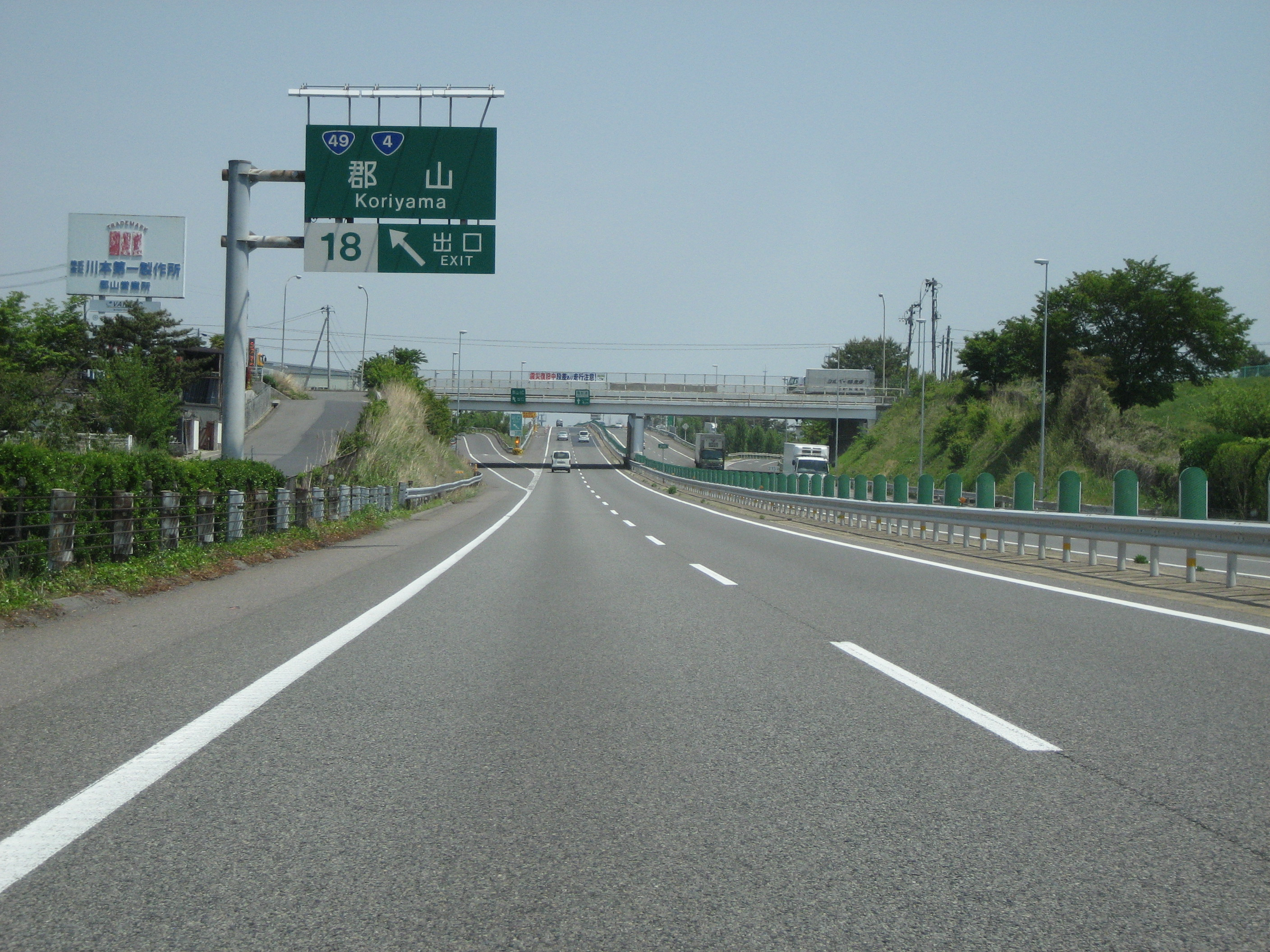 東北自動車道郡山IC下り出口付近